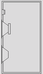 caixa